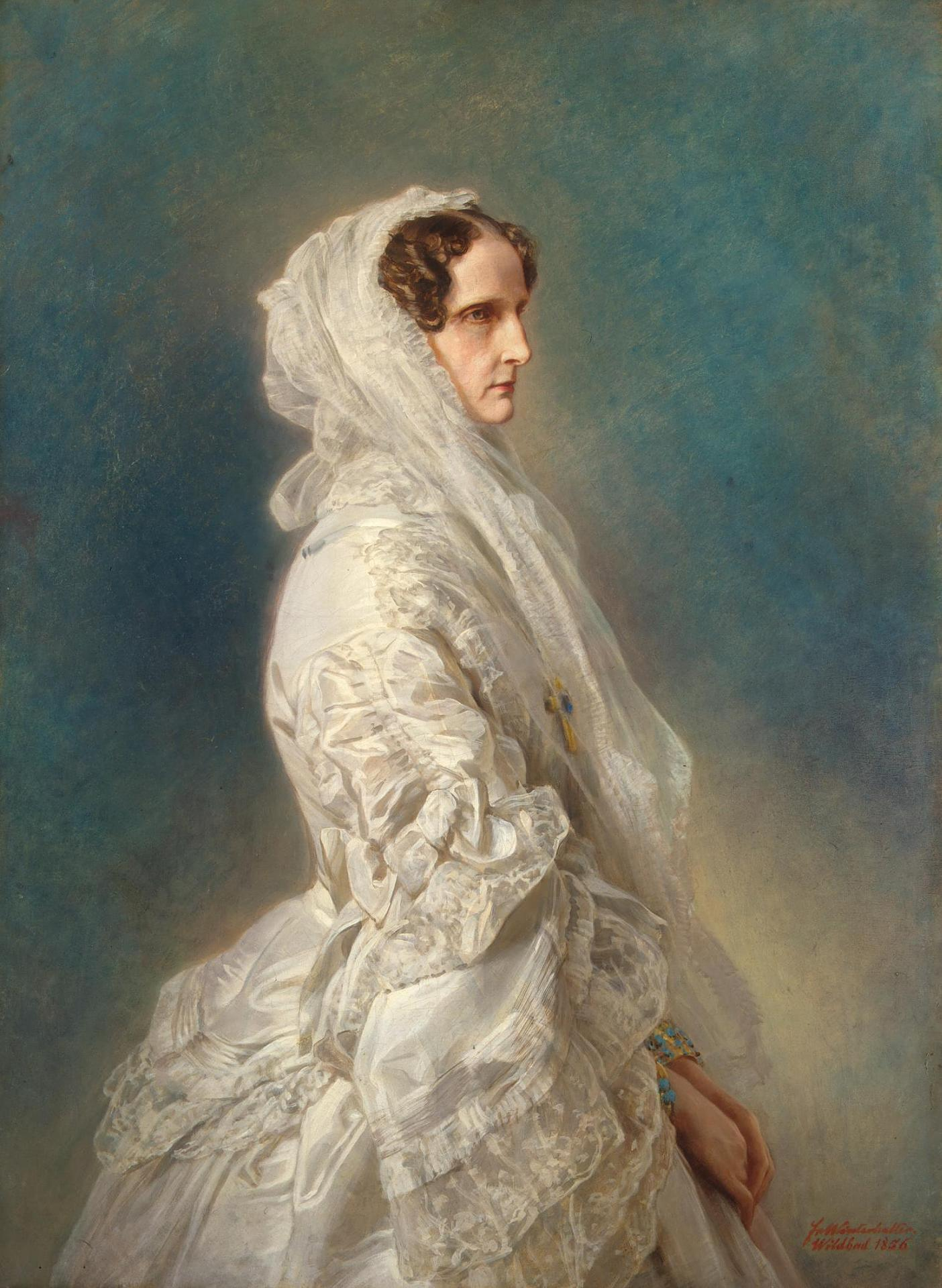 Винтерхальтер, Франсуа Ксавье. Портрет императрицы Александры Федоровны. 1856 г.